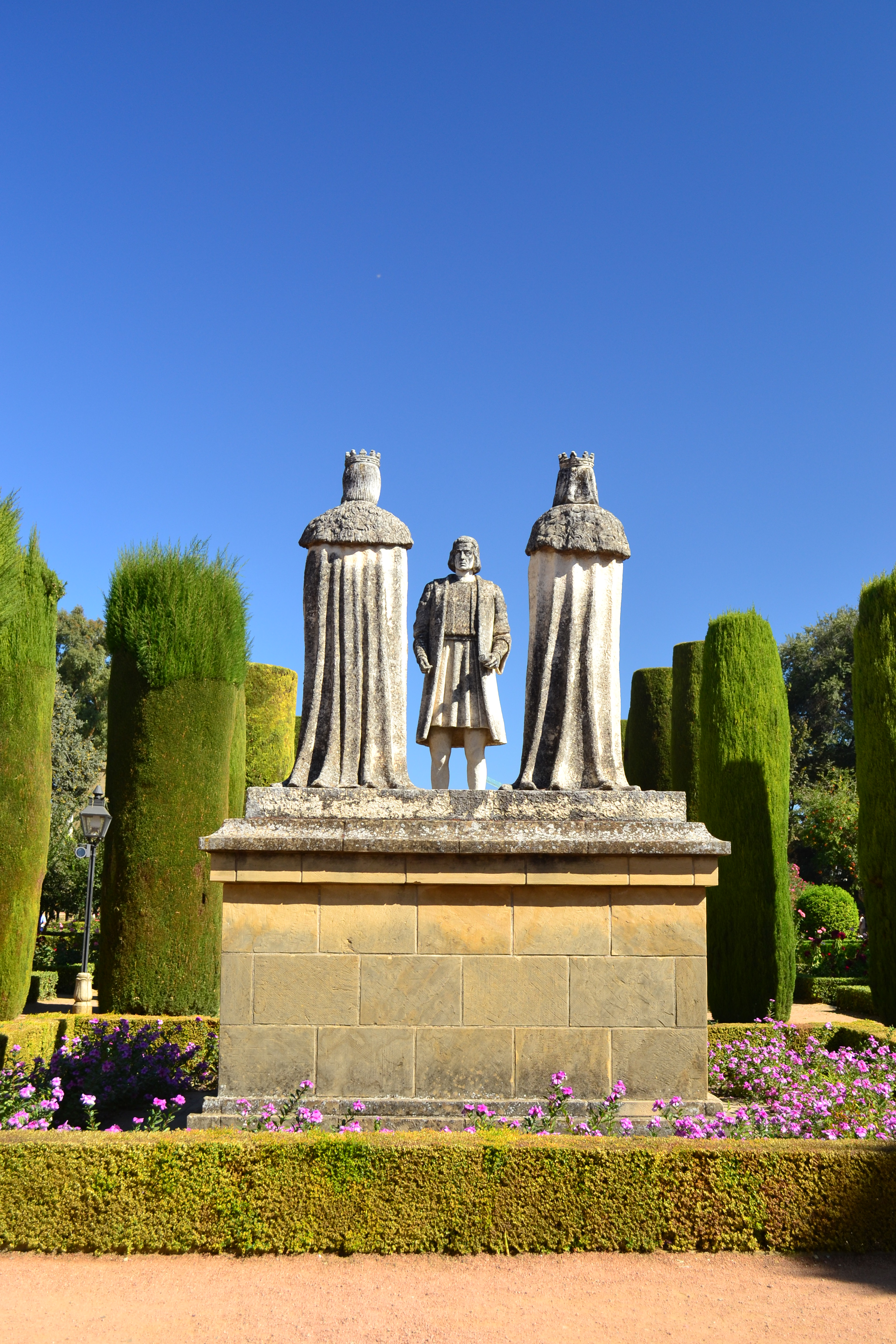 Alcázar de los Reyes Cristianos, Córdoba (España).